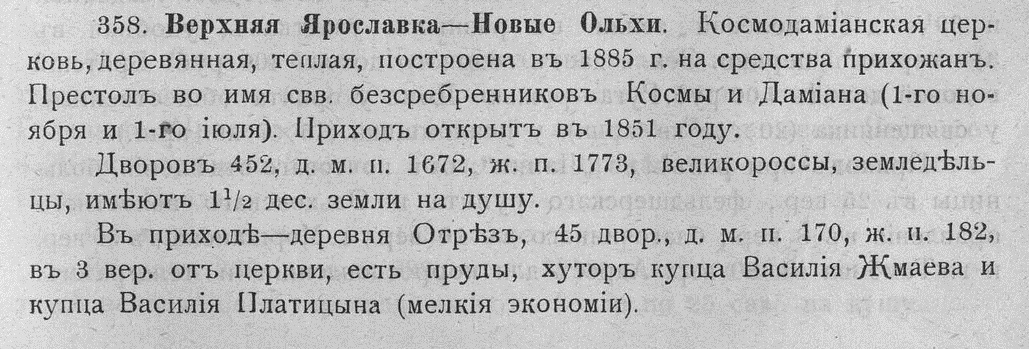 Историко-статистическое описание Тамбовской епархии, 1911 год